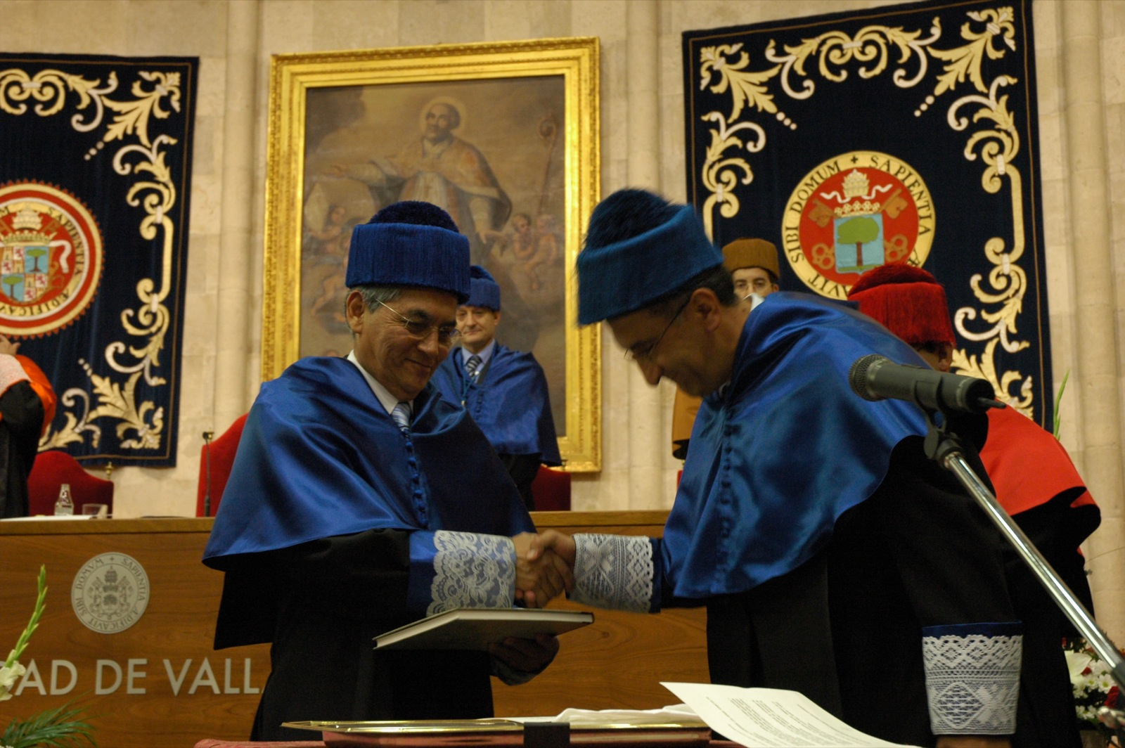 El Padrino dando la mano al Honoris Causa